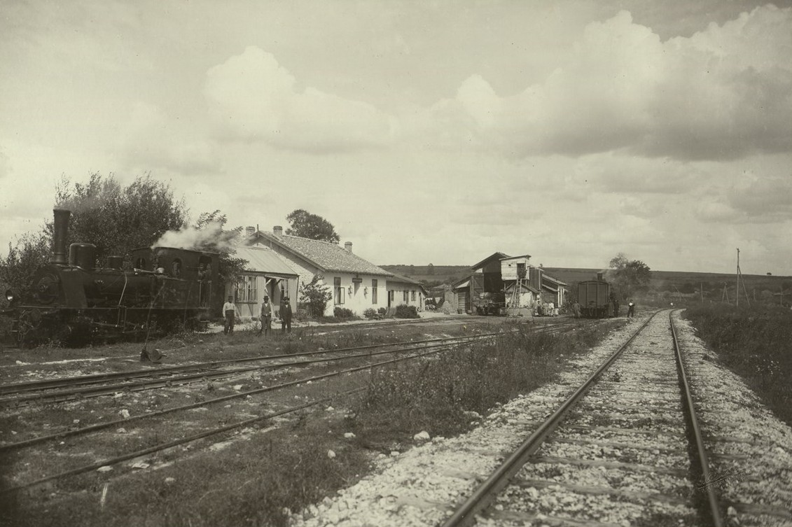 Железопътната станция за скални блокове при каменната кариера в с. Малък Аладън (дн. с. Езерово)